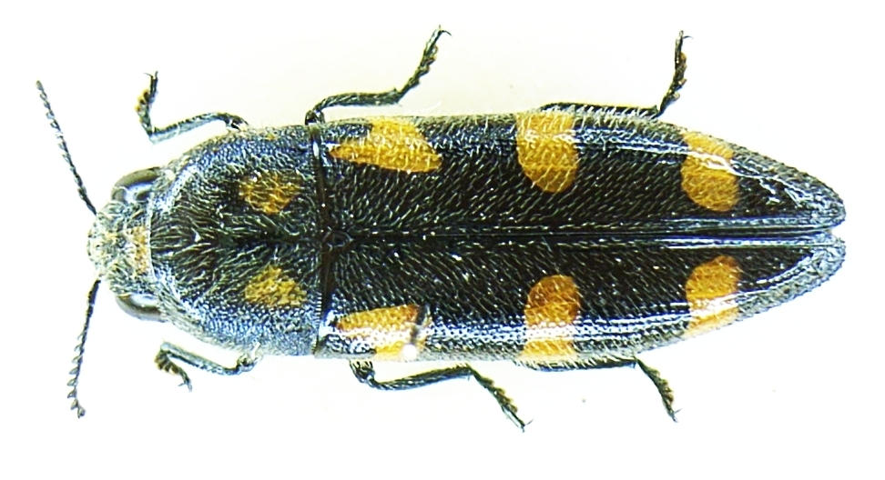 Ptosima flavoguttata